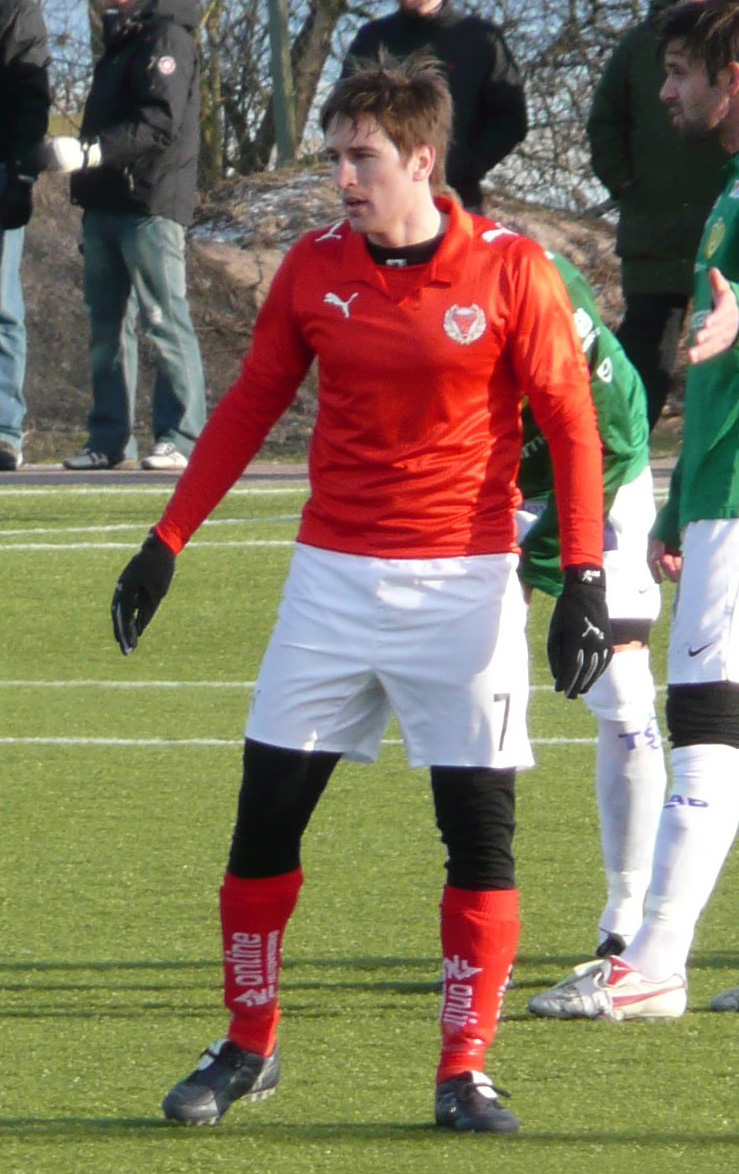 Jimmie Augustsson, Kalmar FF